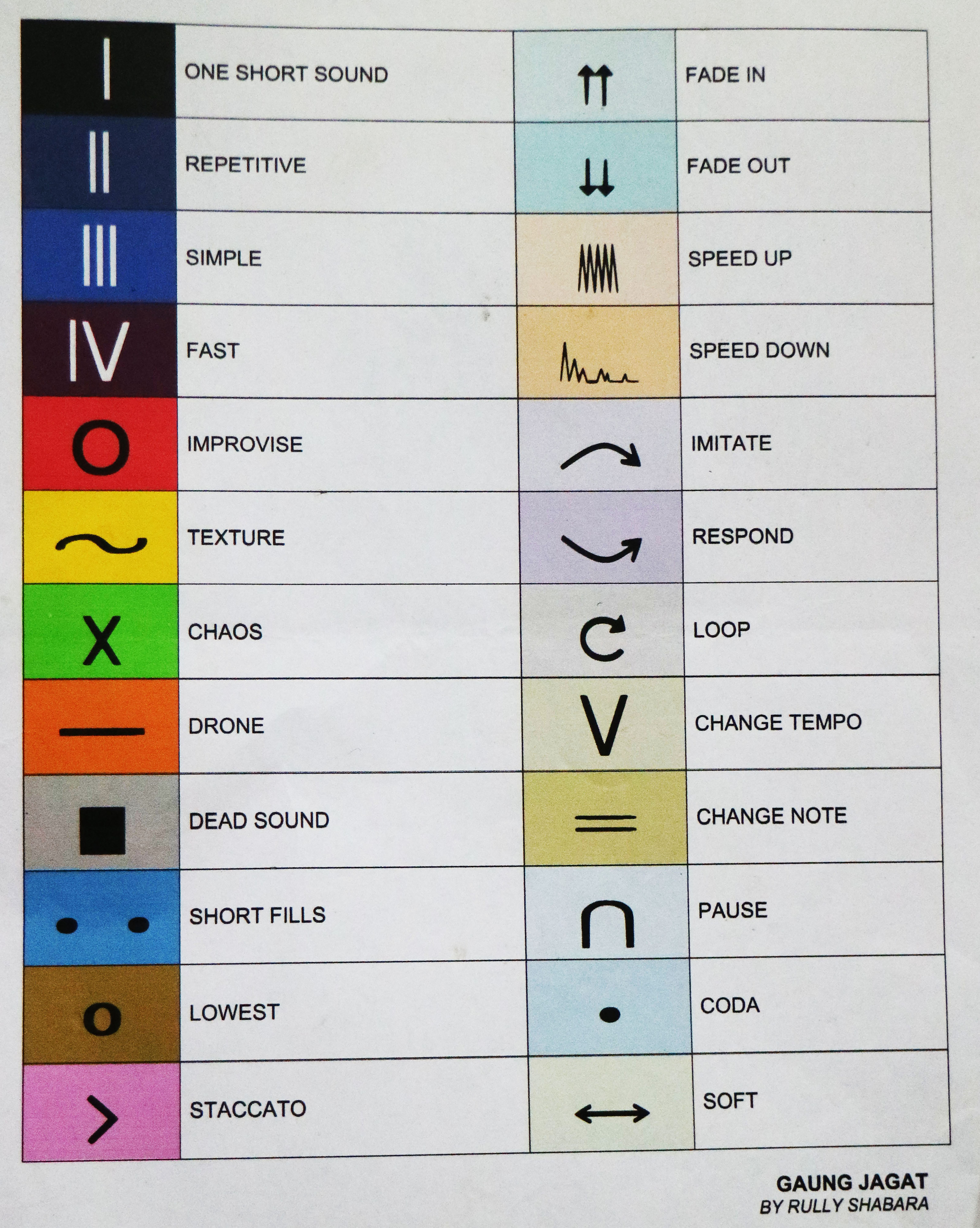 Simbol yang digunakan untuk aba-aba Gaung Jagat